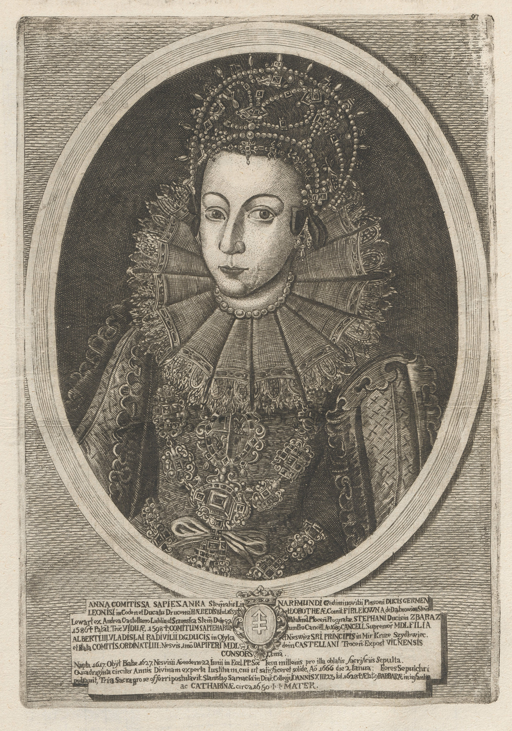 Беларуская (тарашкевіца): Партрэт Ганны Радзівіл (Hanna Radzivił) з роду Сапегаў (Sapieha)